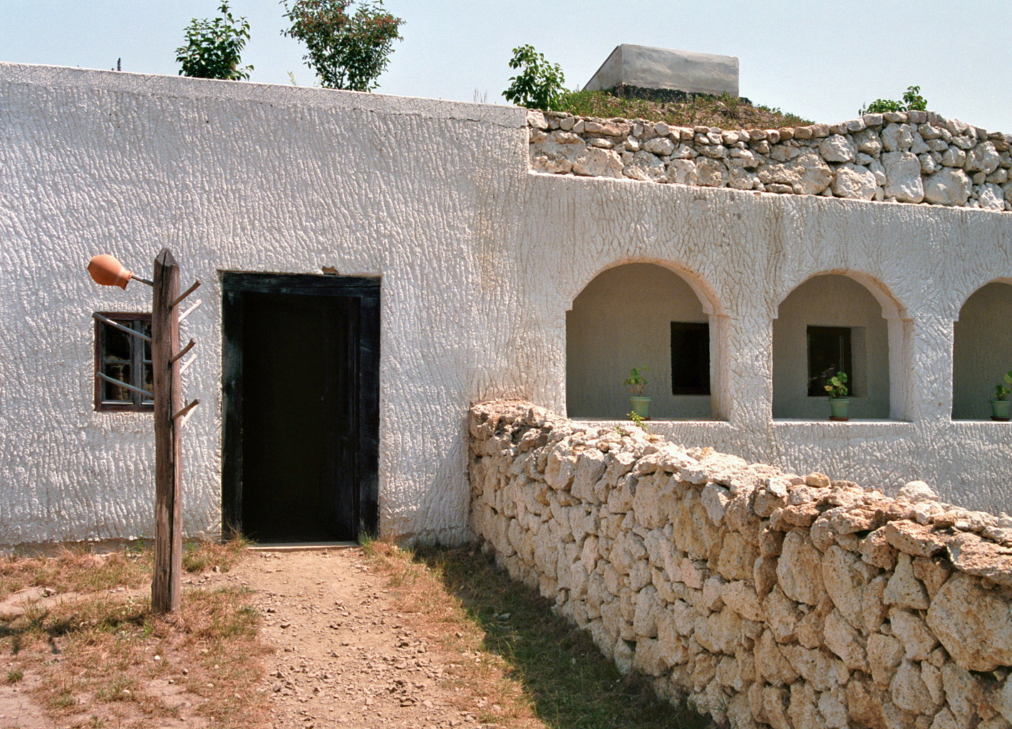 Szentendre-Skanzen (Ungarisches Freilichtmuseum): Nordungarische Höhlenwohnung armer Leute aus Szomolya; frühes 20. Jahrhundert.